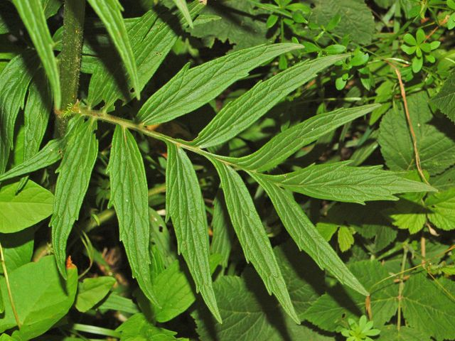 Valerianaceae - Valeriana officinalis